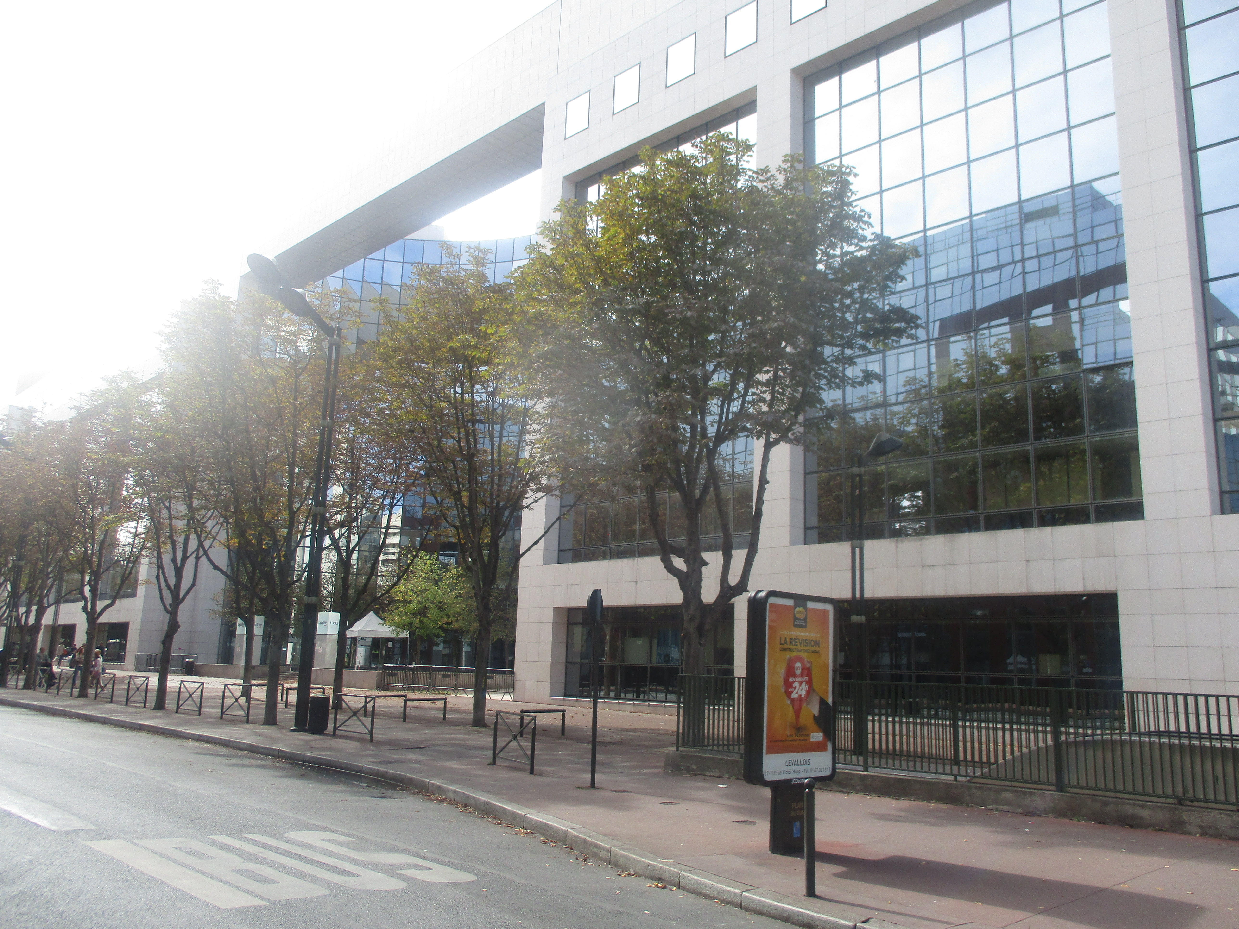 Immeuble de Lagardère Active (ex-Hachette Filipacchi) à Levallois-Perret, rue Anatole-France.